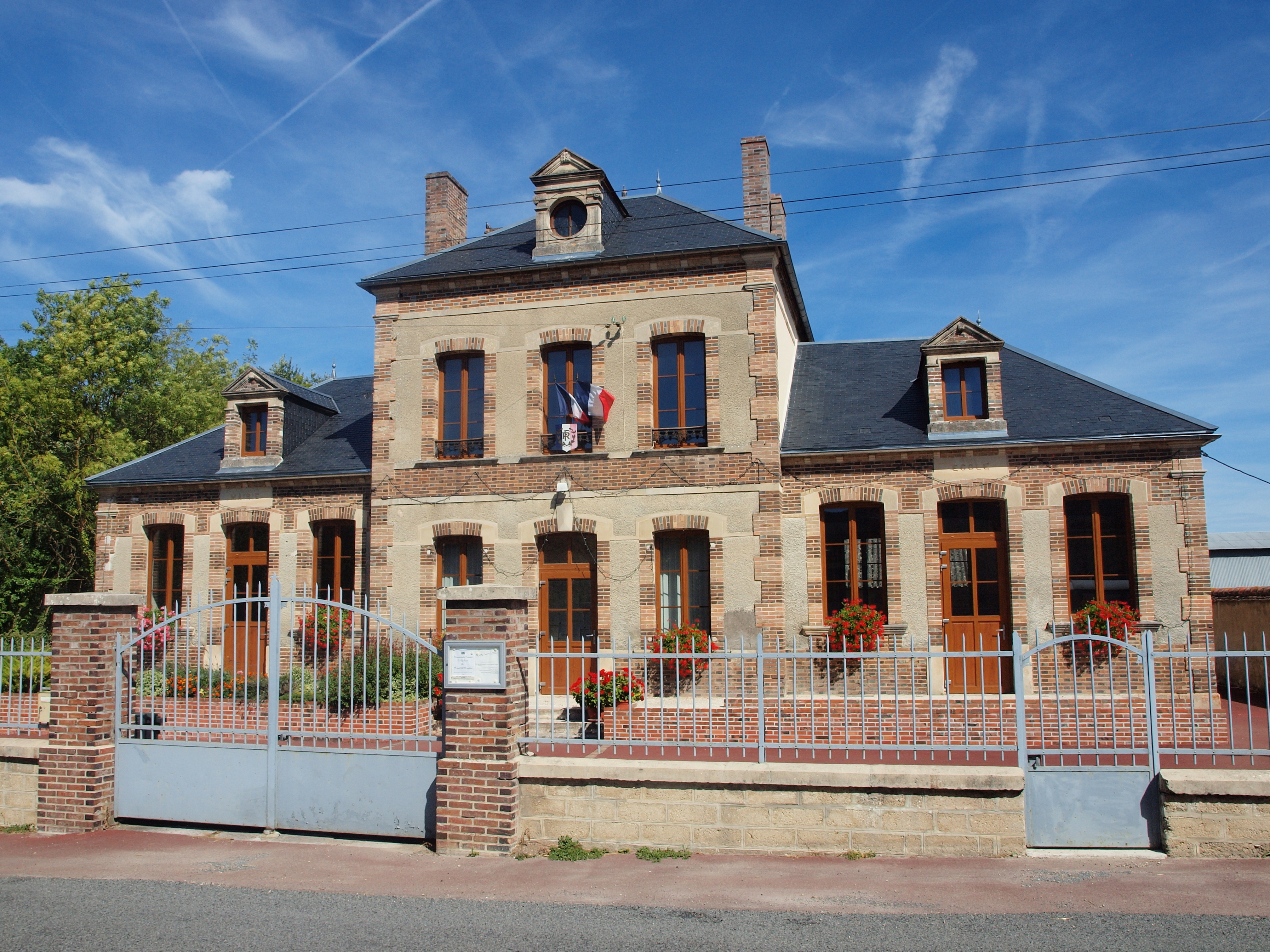 Mairie de Bourdenay (Aube, France)